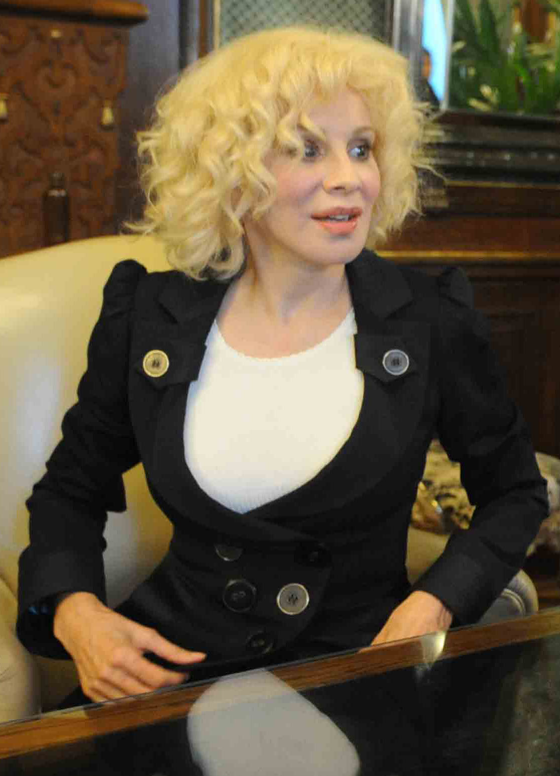 La actriz Nacha Guevara, en el Despacho Presidencial de Casa de Gobierno.